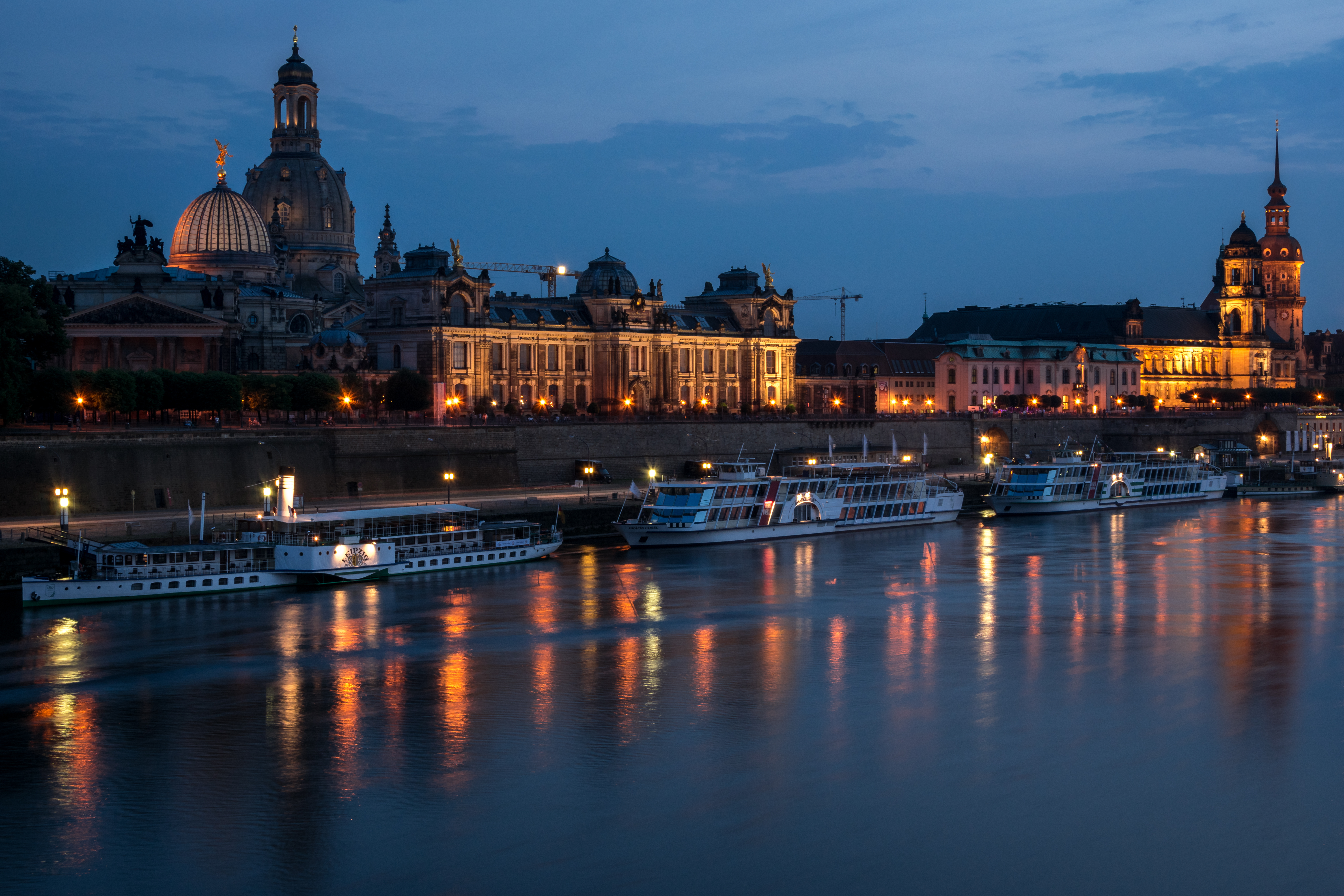 Blick auf Dresden in der blauen Stunde, fotografiert von der Carola Brücke